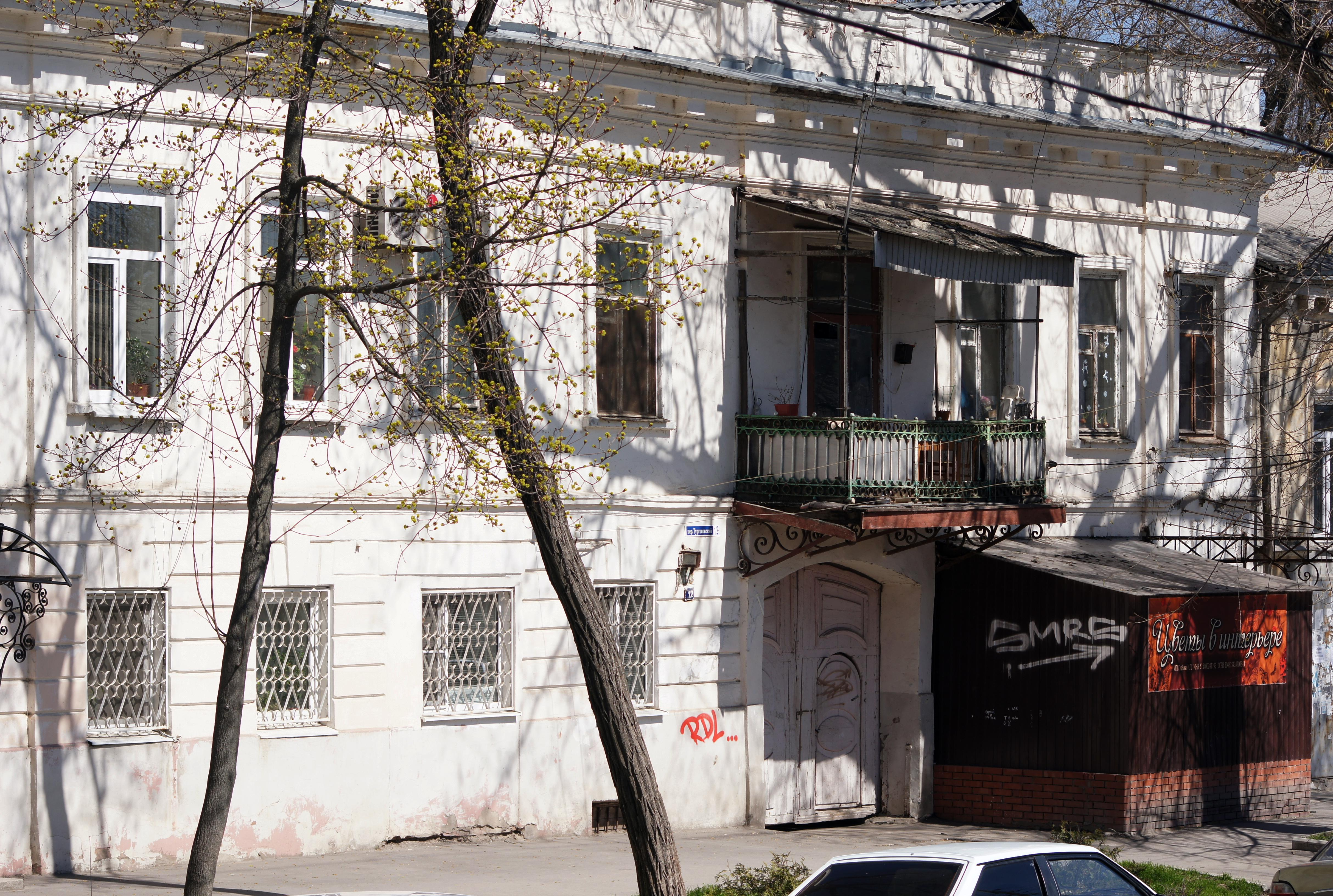 Таганрог, Дом Рубанчика (пер. Тургеневский, 12)